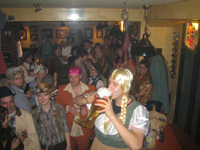 Pascal Hens beim Ansagen eines Stiefels.